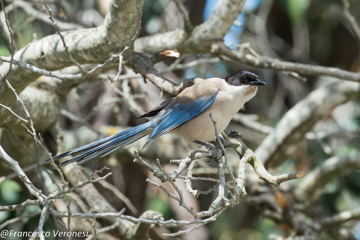 Iberian Magpie Cyanopica cooki - Algarve - Portugal CD5A4802